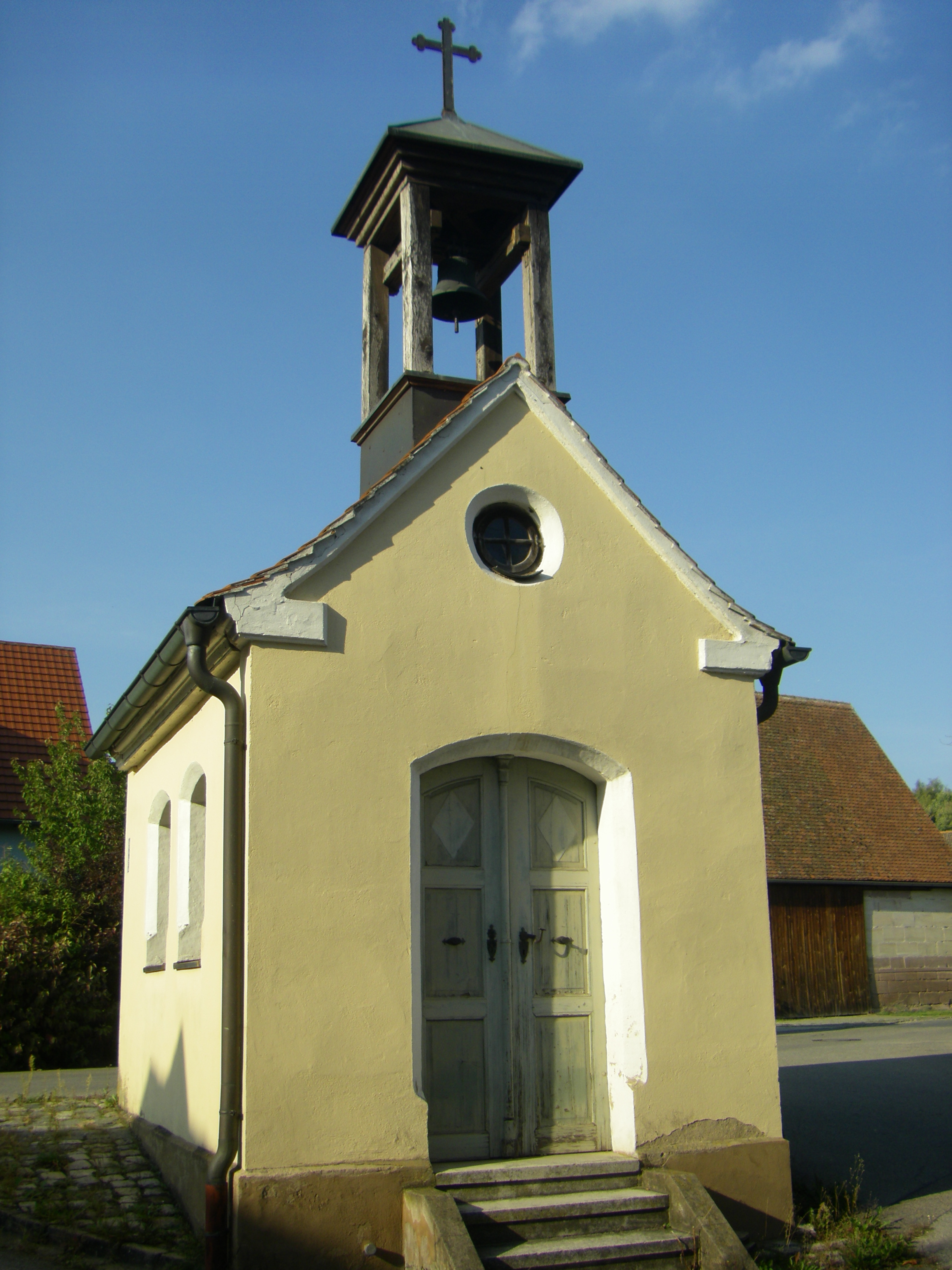 Ortskapelle in Leipersloh, Windsbach